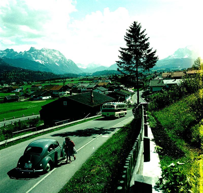 Oberammergau Reise - Wallgau 14. Mai - 18. Mai 1960 Information added by Wikimedia users.Bundesstraße 11